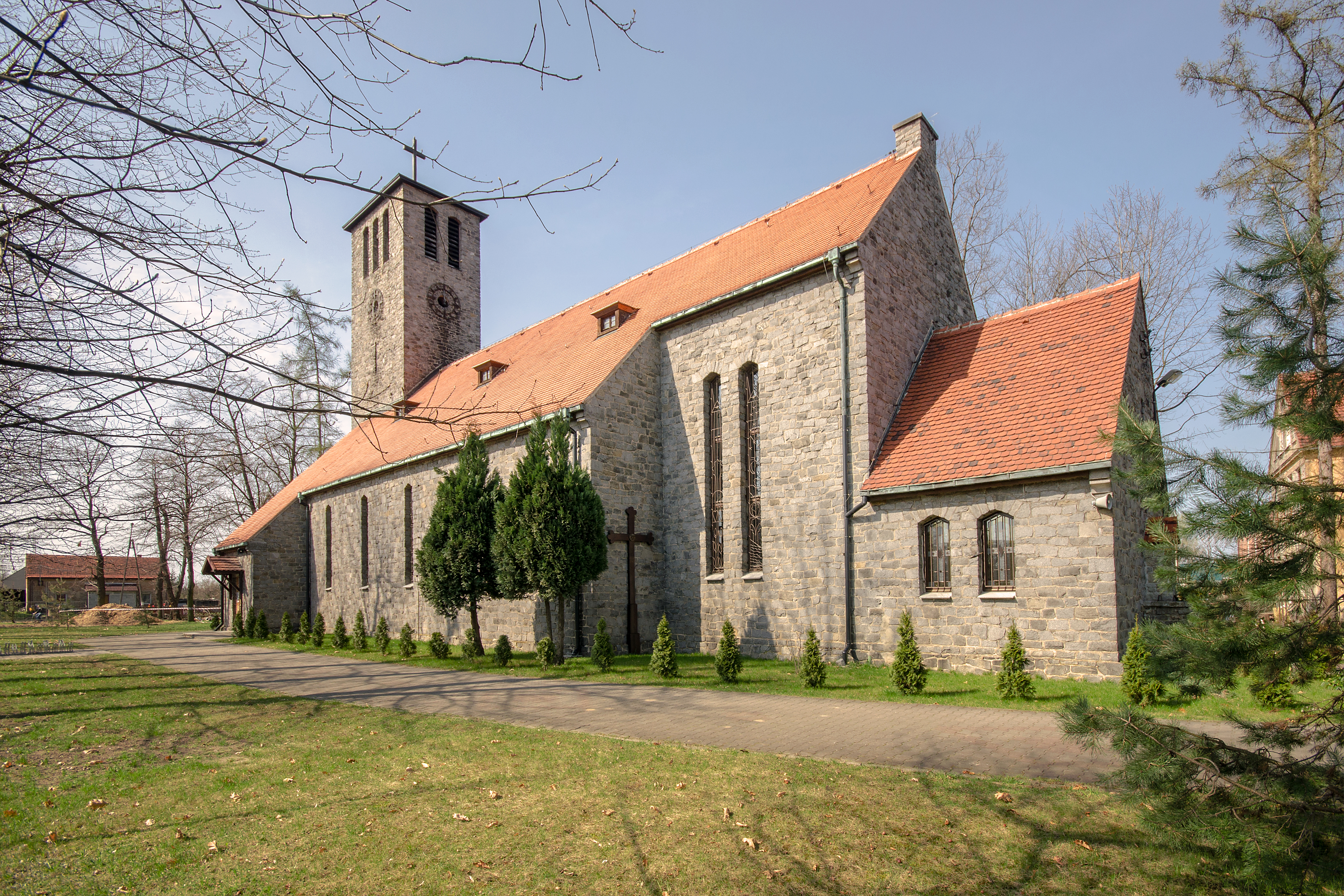 Marcinkowice, ul. Szkolna - rzymskokatolicki kościół parafialny p.w. św. Marcina Biskupa, 1931-1932